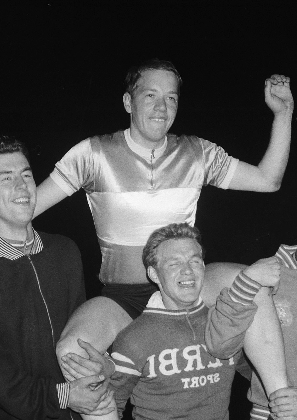 Stayerswedstrijd. Aad de Graaf